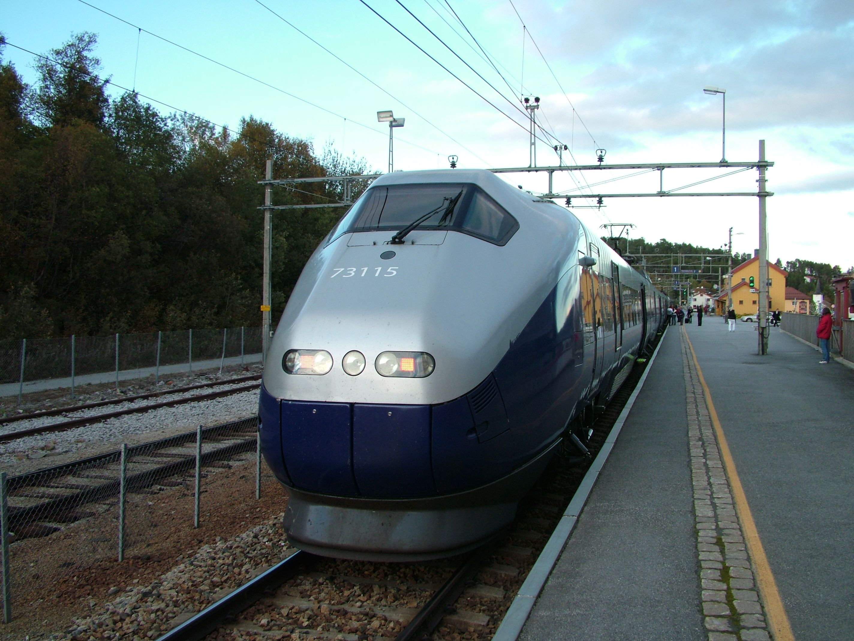 Norwegen, die Bergenbahn in Geilo